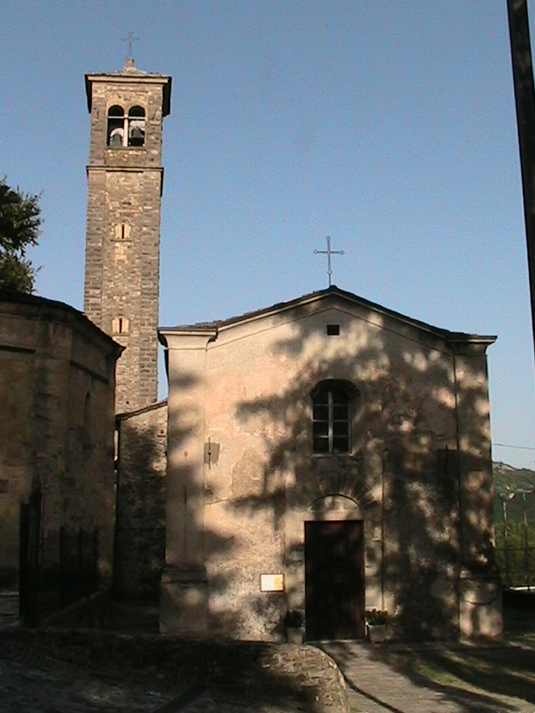 Serravalle (Varano de' Melegari) - Pieve di San Lorenzo